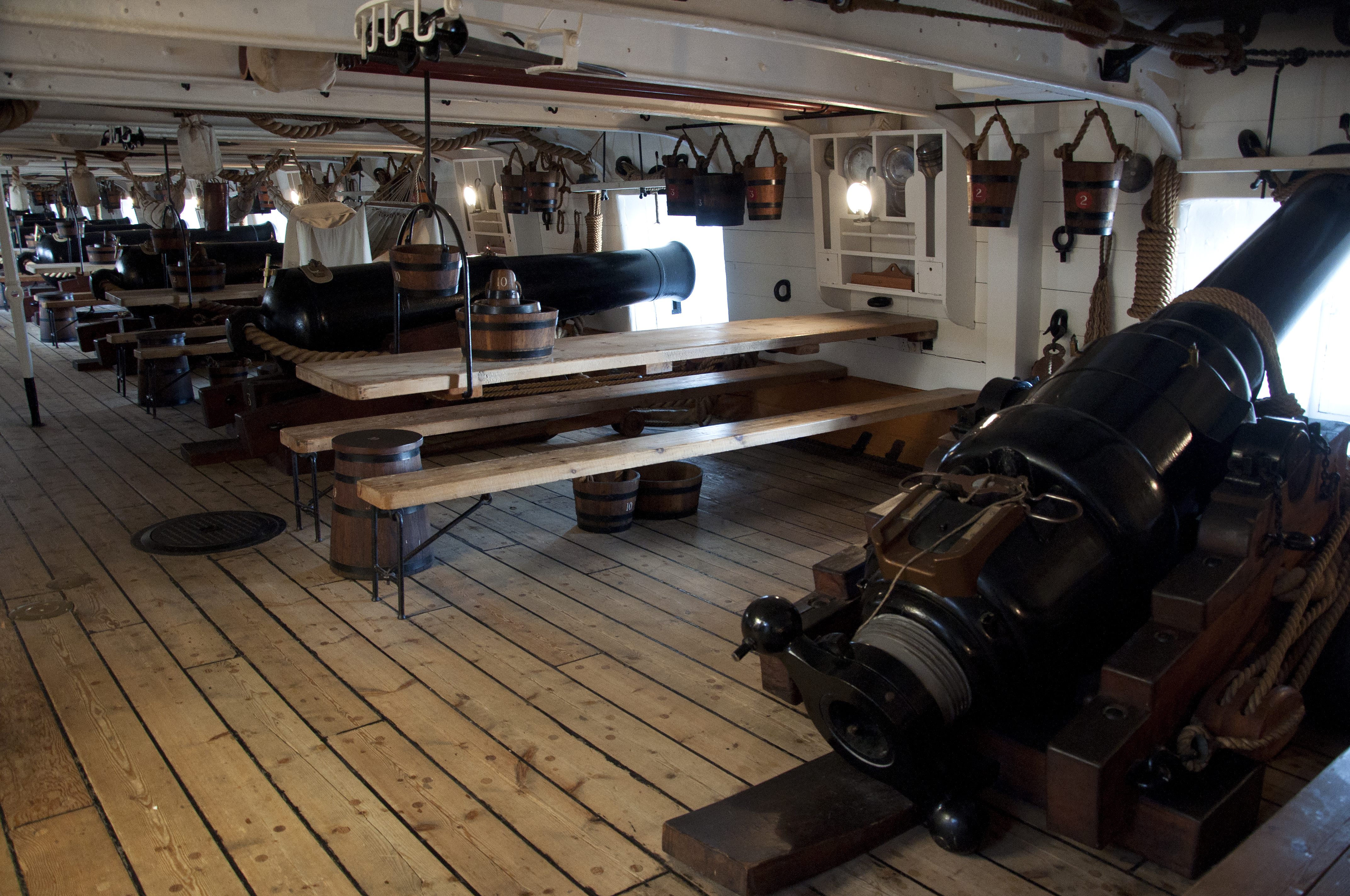 Het geschutsdek aan boord van de HMS Warrior te Portsmouth, Engeland